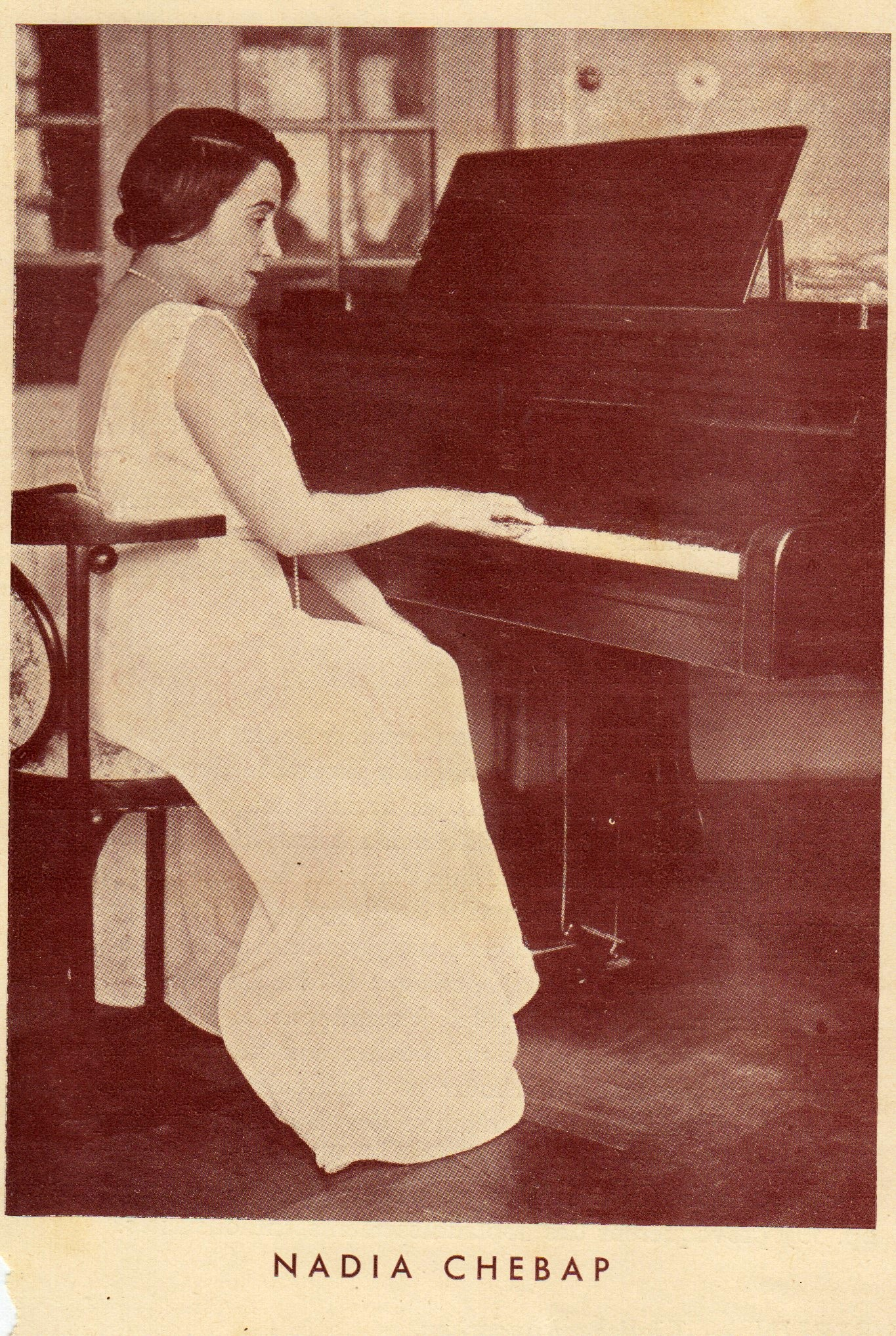 Nadia Chebap pliant pag. 1